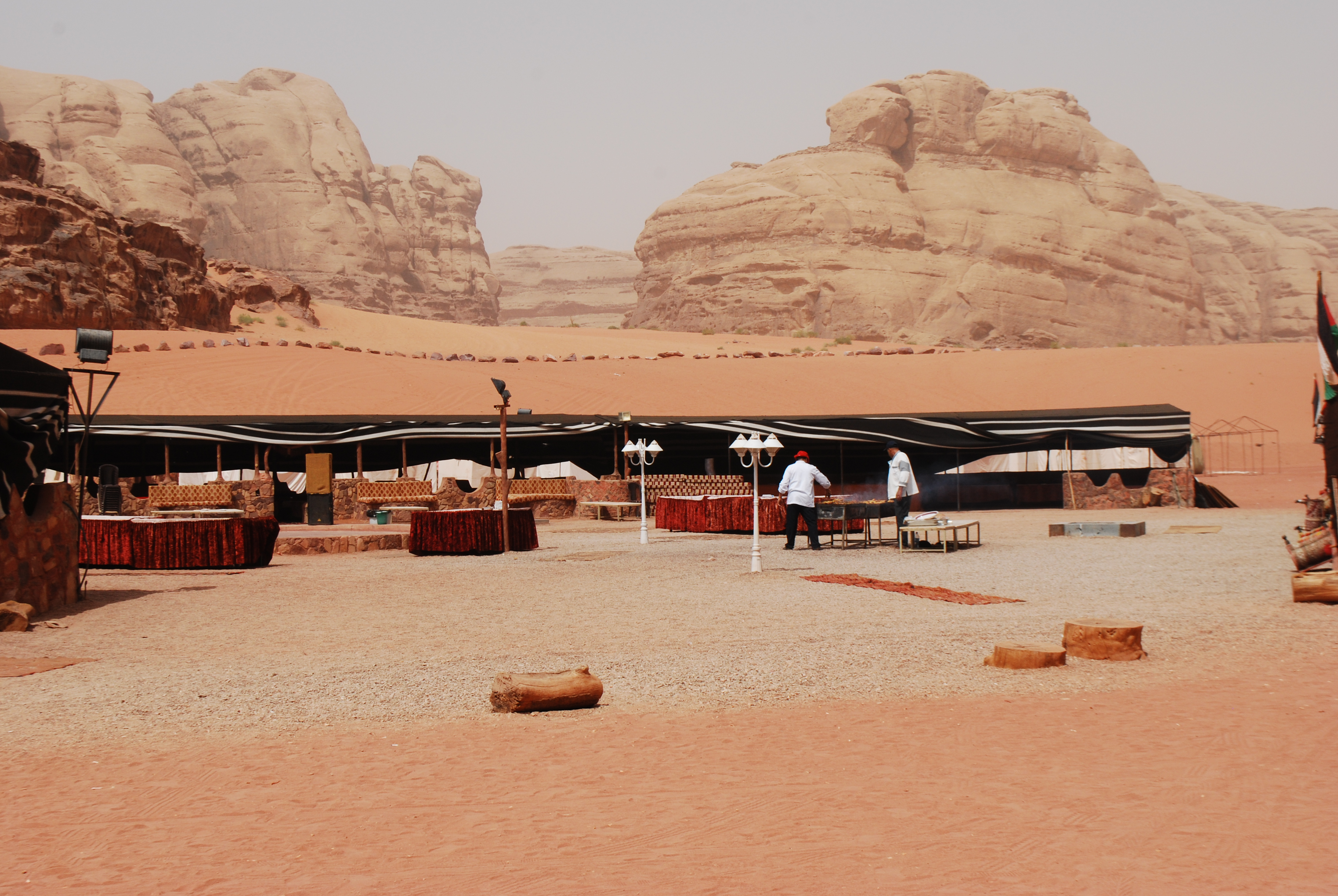 Camp (restauration et hébergement) à proximité de Diseh, dans le Wadi Rum.